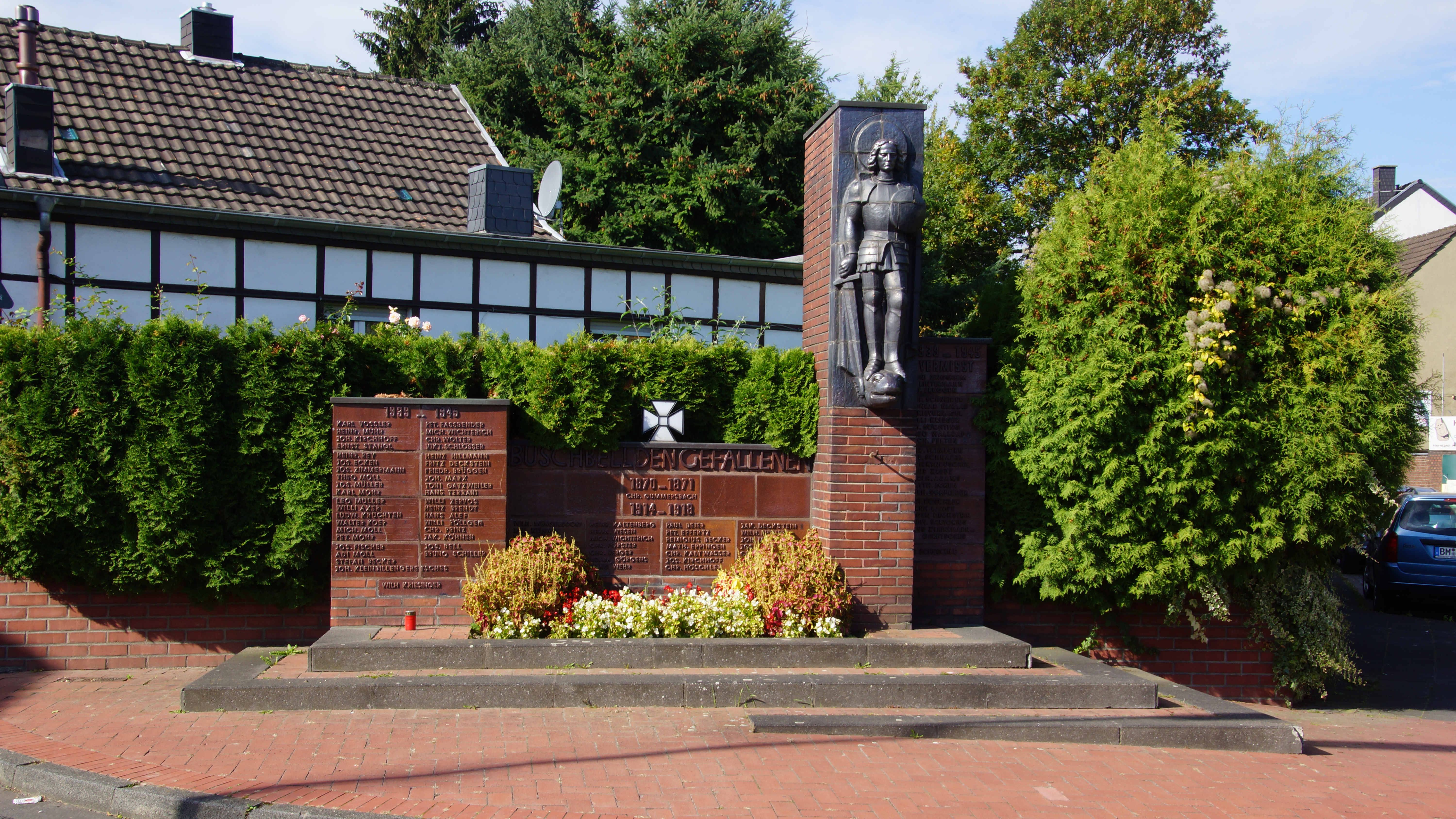 Kriegsdenkmal in Frechen-Buschbell This is a photograph of an architectural monument. 90